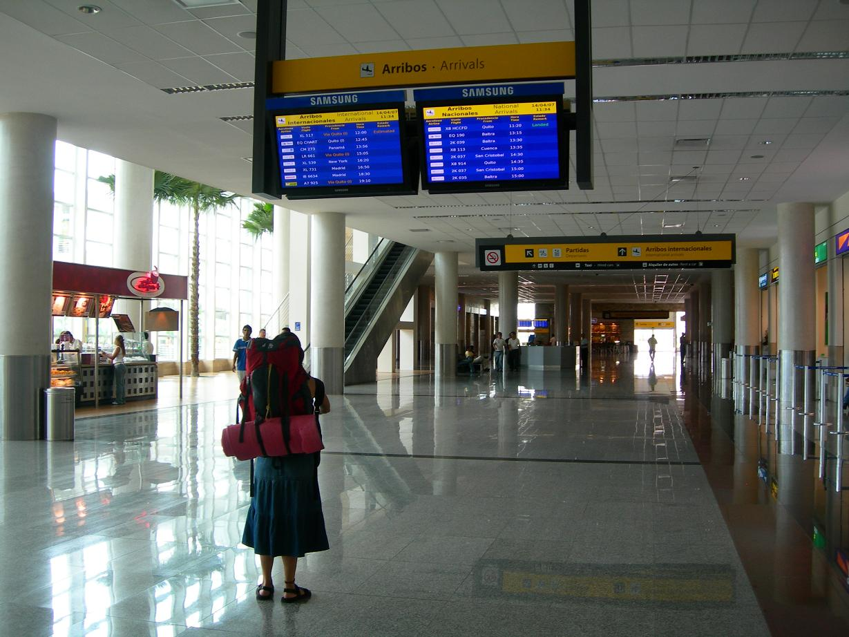 Turista consultando horarios en la zona de llegadas del Aeropuerto internacional de Guayaquil